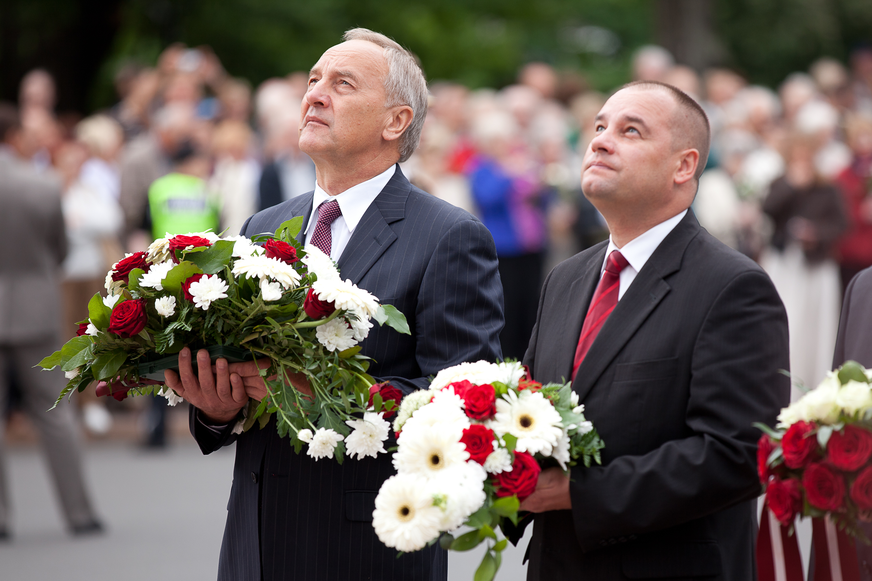 Andris Bērziņš un Gundars Daudze 2011.gada 14.jūnijs. Saeimas deputāti piedalās ziedu nolikšanas ceremonijā pie Brīvības pieminekļa, kas veltīta Komunistiskā genocīda upuru piemiņai. Attēlā no kreisās: Andris Bērziņš un Gundars Daudze. Foto: Saeima Foto: Saeima